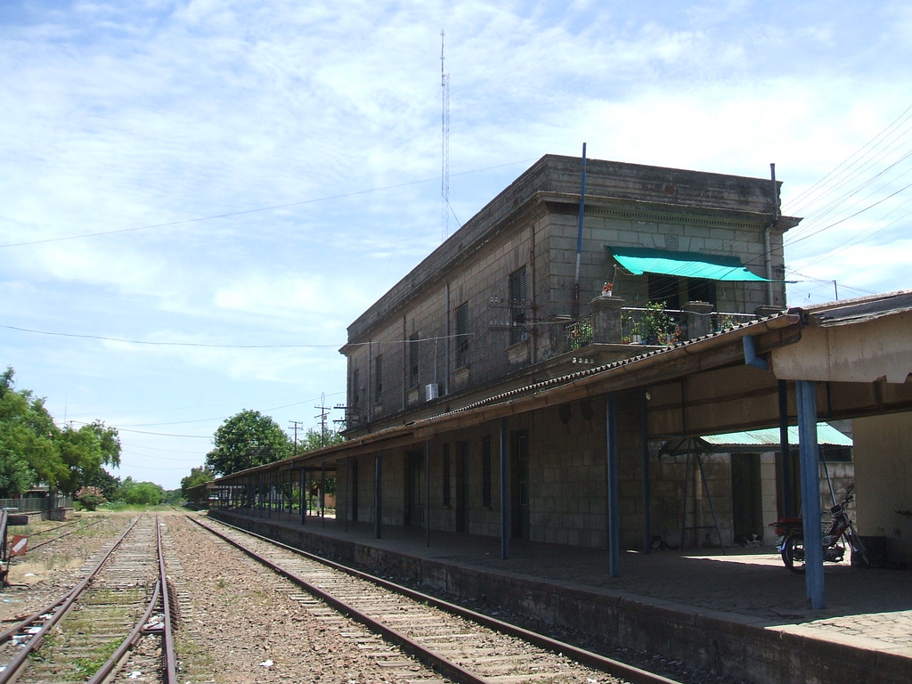 Estaci�n de trenes. Salto, Uruguay